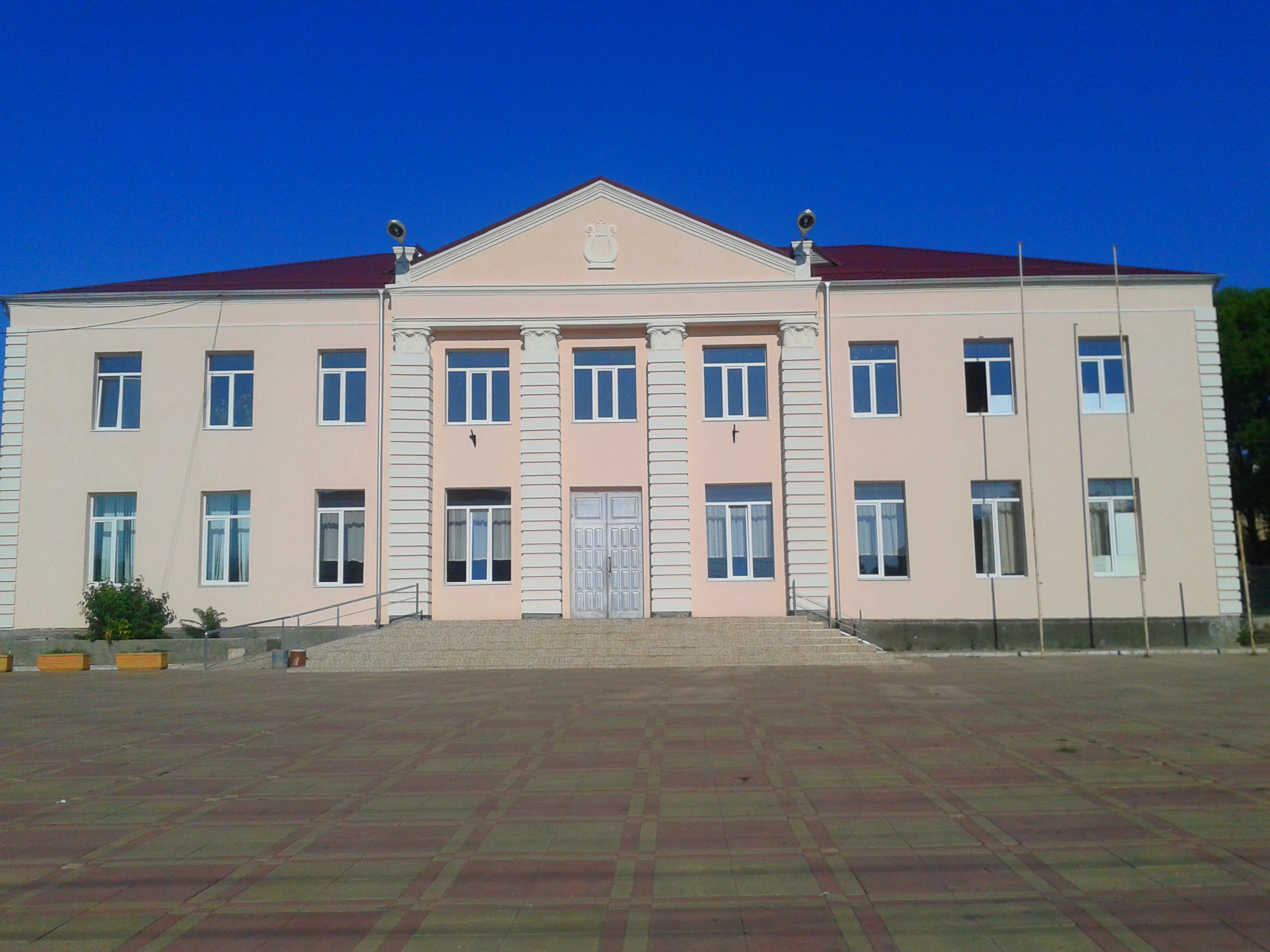 Дом культуры в Комрате